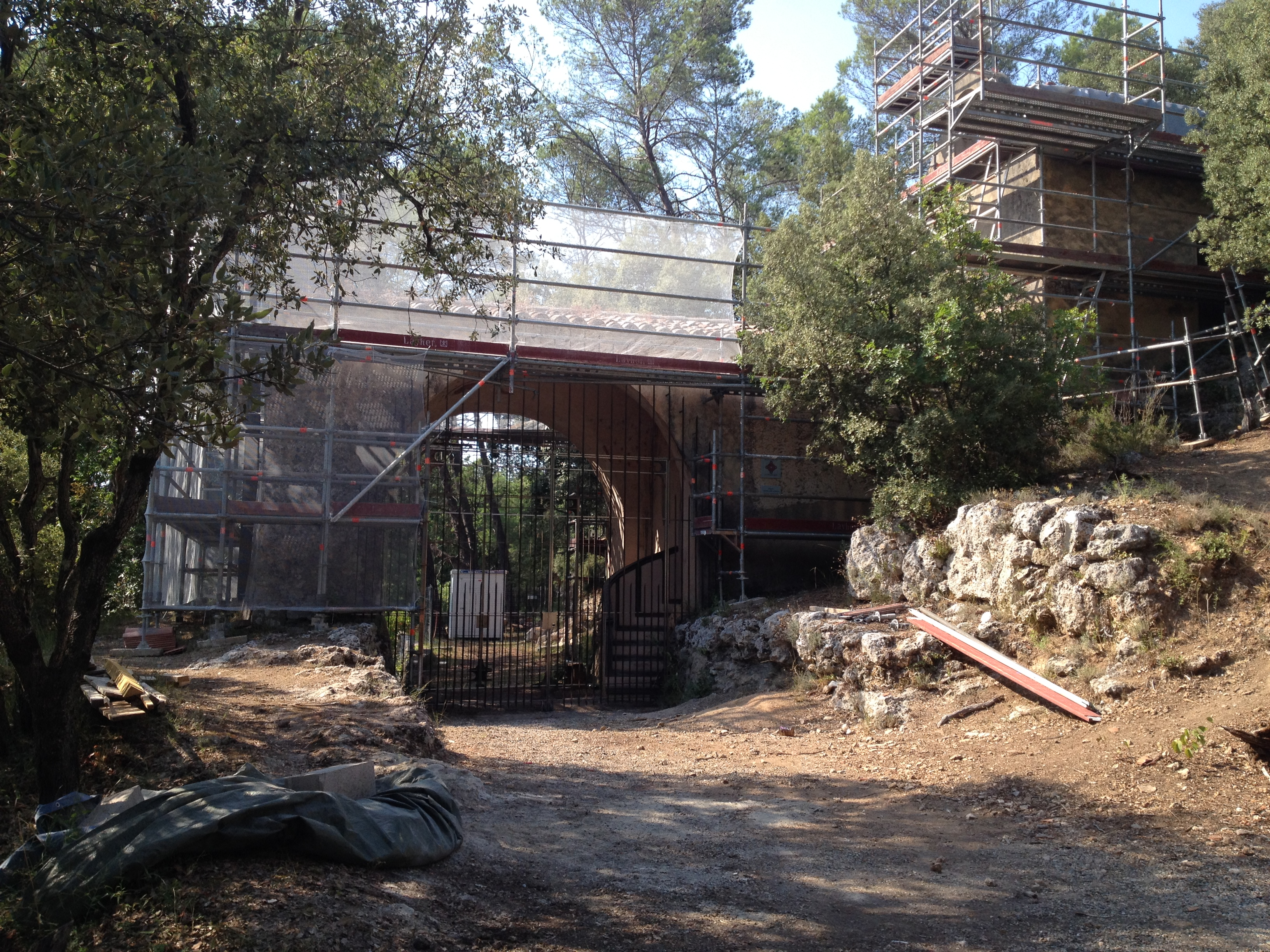 Chapelle Notre-Dame de Benva en rénovation (côté sud-ouest)